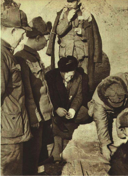 195103 妮娜·苏联水利专家布科夫治理淮河